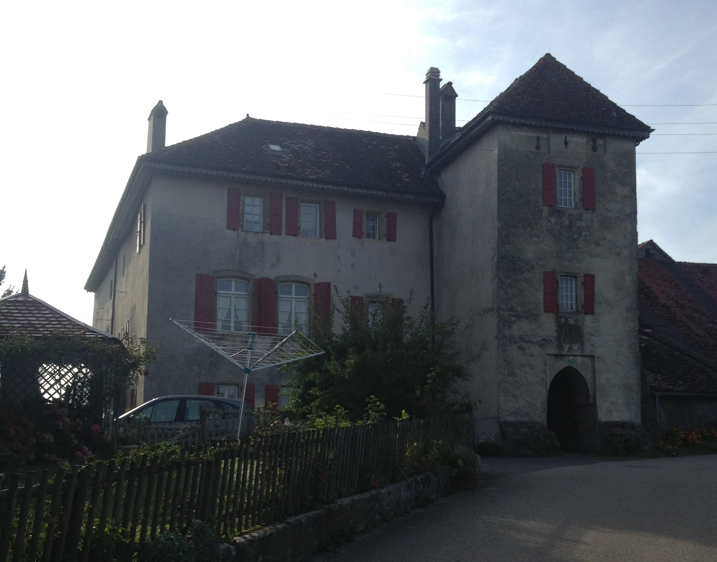 Le château de Combremont-le-Grand dans le canton de Vaud en Suisse.